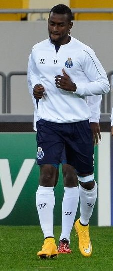 Джексон Мартінес під час виступів за Порту